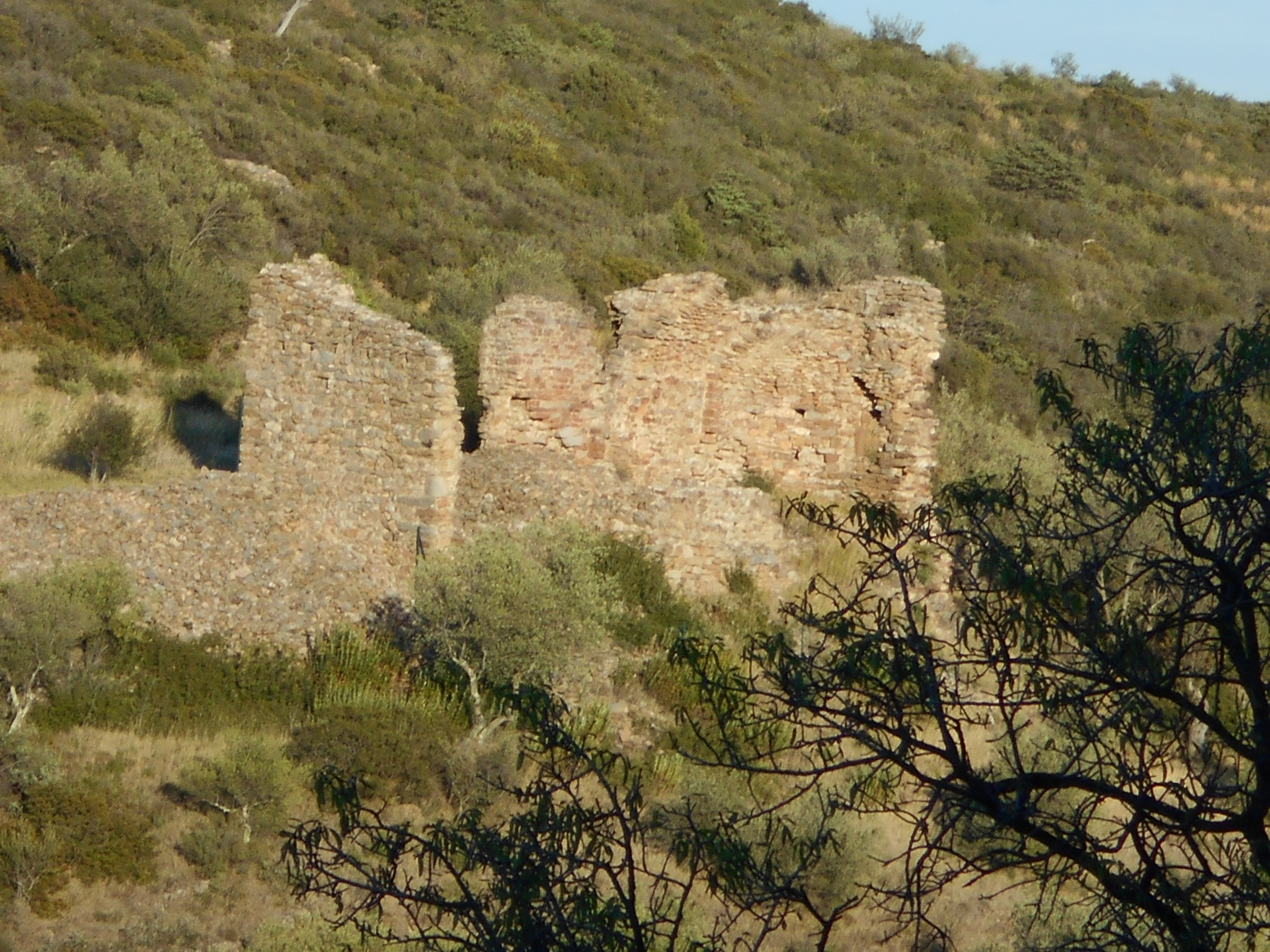 L'església vella de Sant Pau de Calce 2